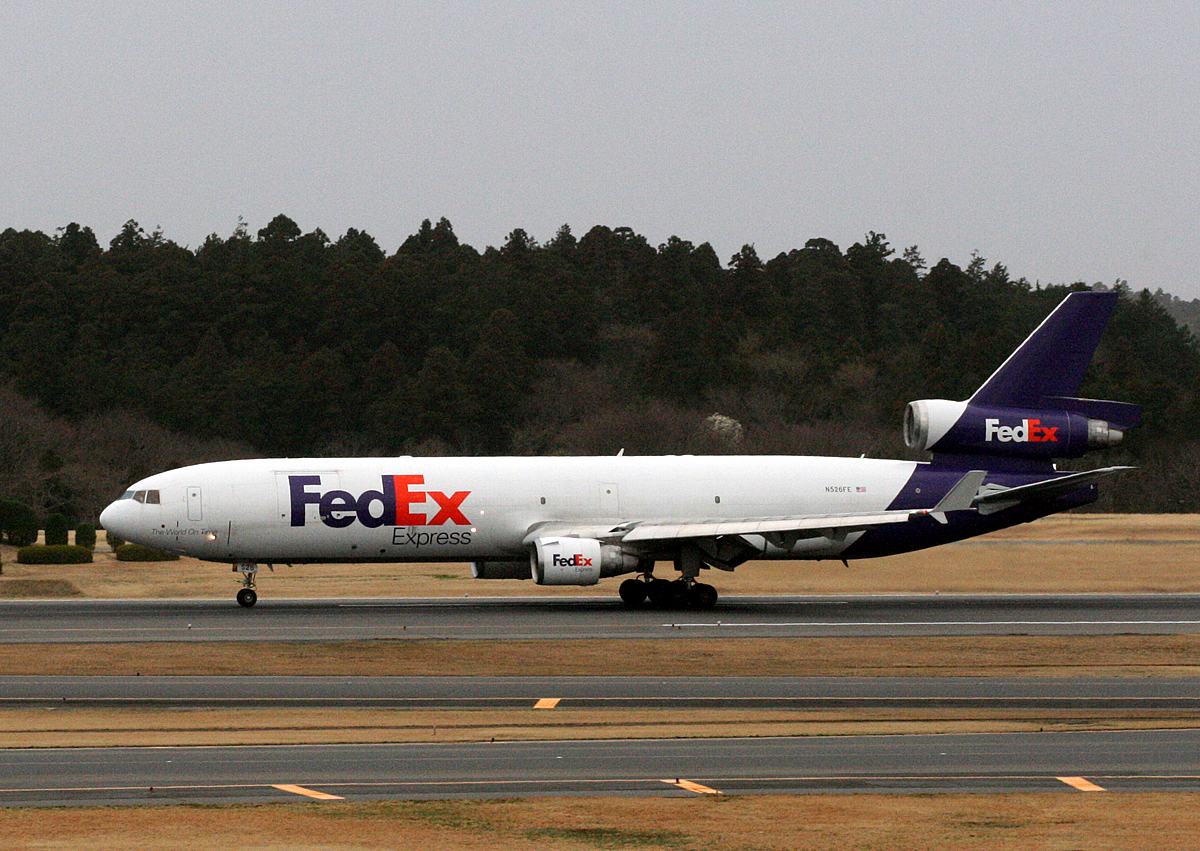 N526FEが成田空港を最後に離陸したフライトです(2009年3月22日)